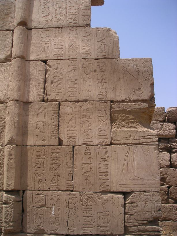 Relief représentant le pharaon Amasis - Chapelle des divines adoratrices Nitocris Ire et Ânkhnesnéferibrê à Karnak - XXVIe dynastie égyptienne